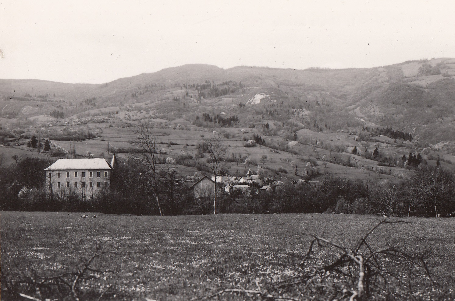 Château de Lornay (Haute-Savoie, France) vers 1900